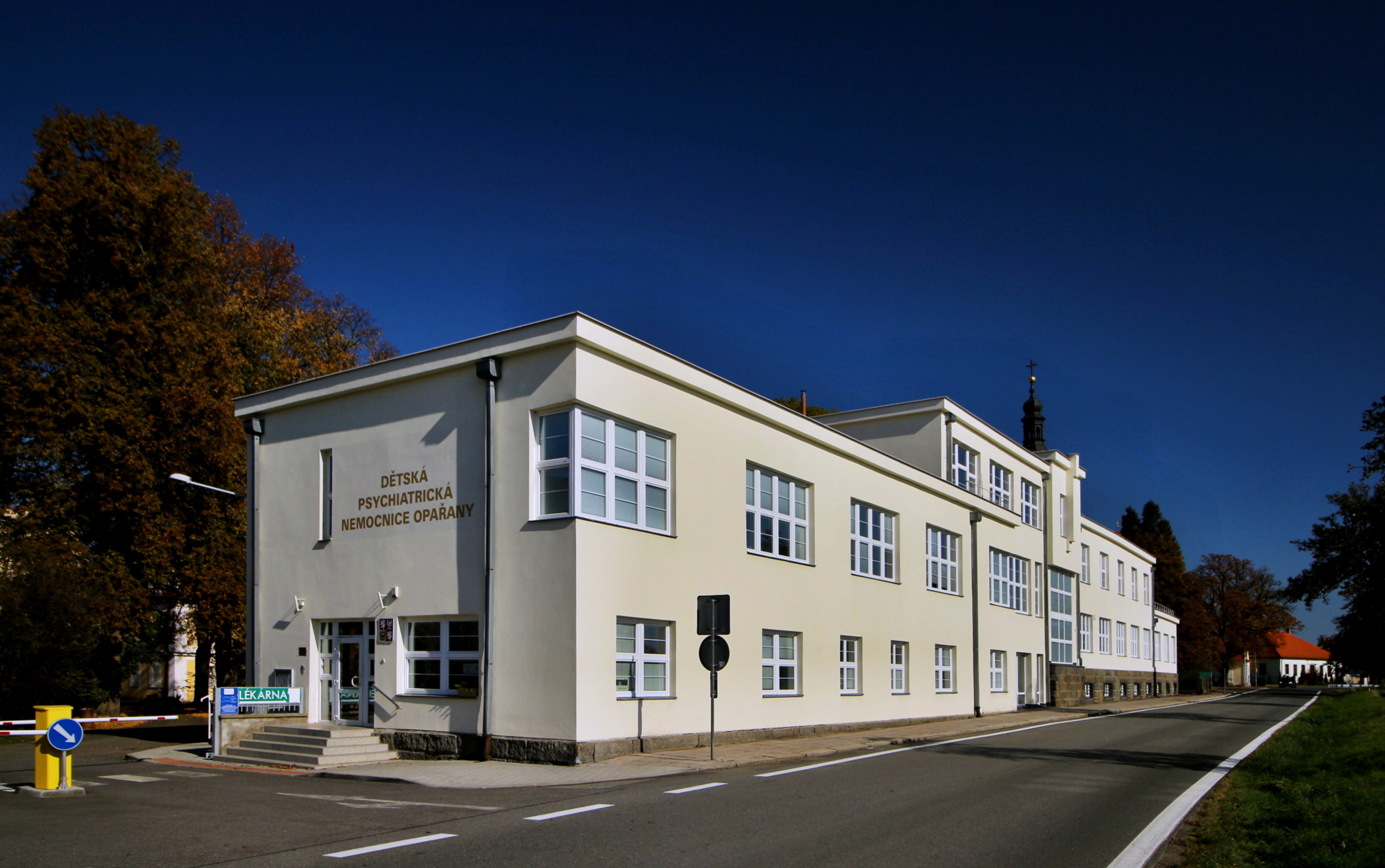 Opařany, okres Tábor